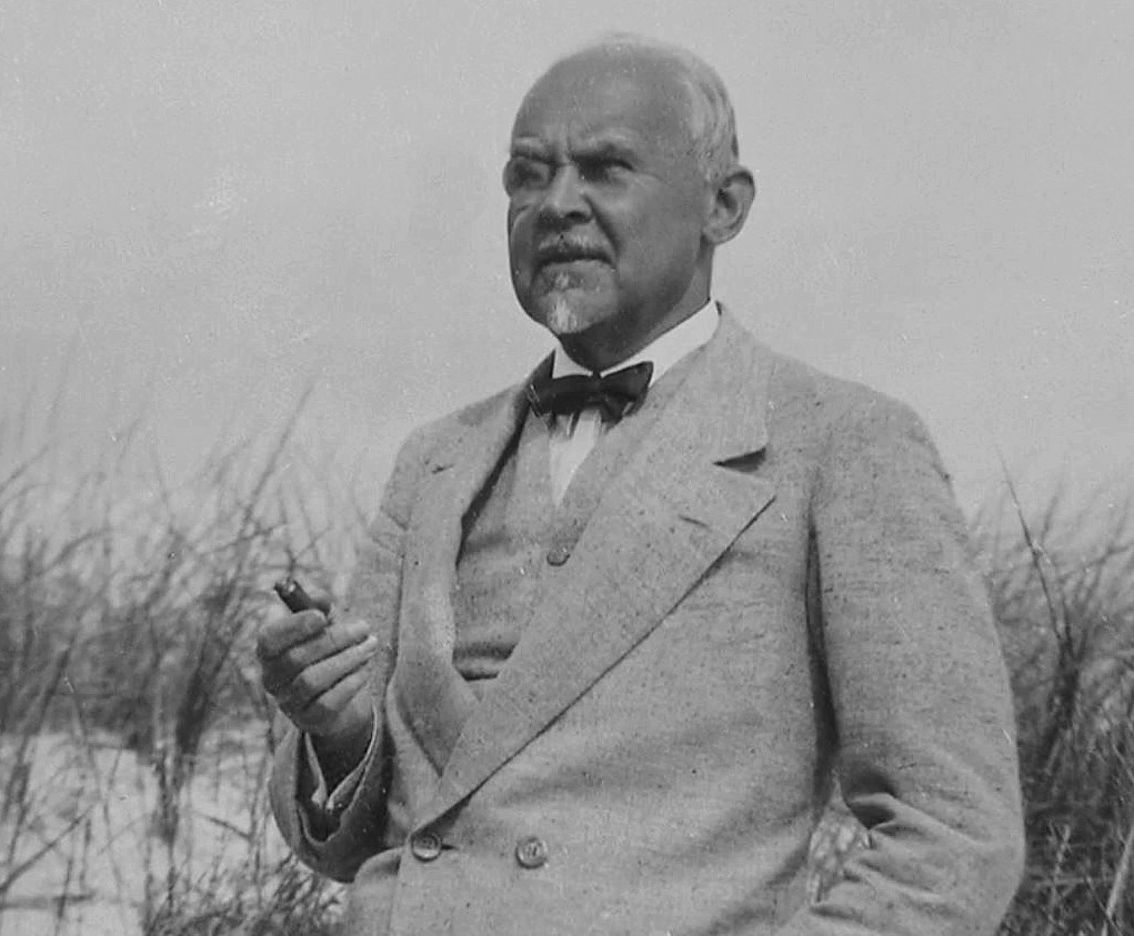 Arkitekt Alfred Grenander (1863–1931) i Falsterbo